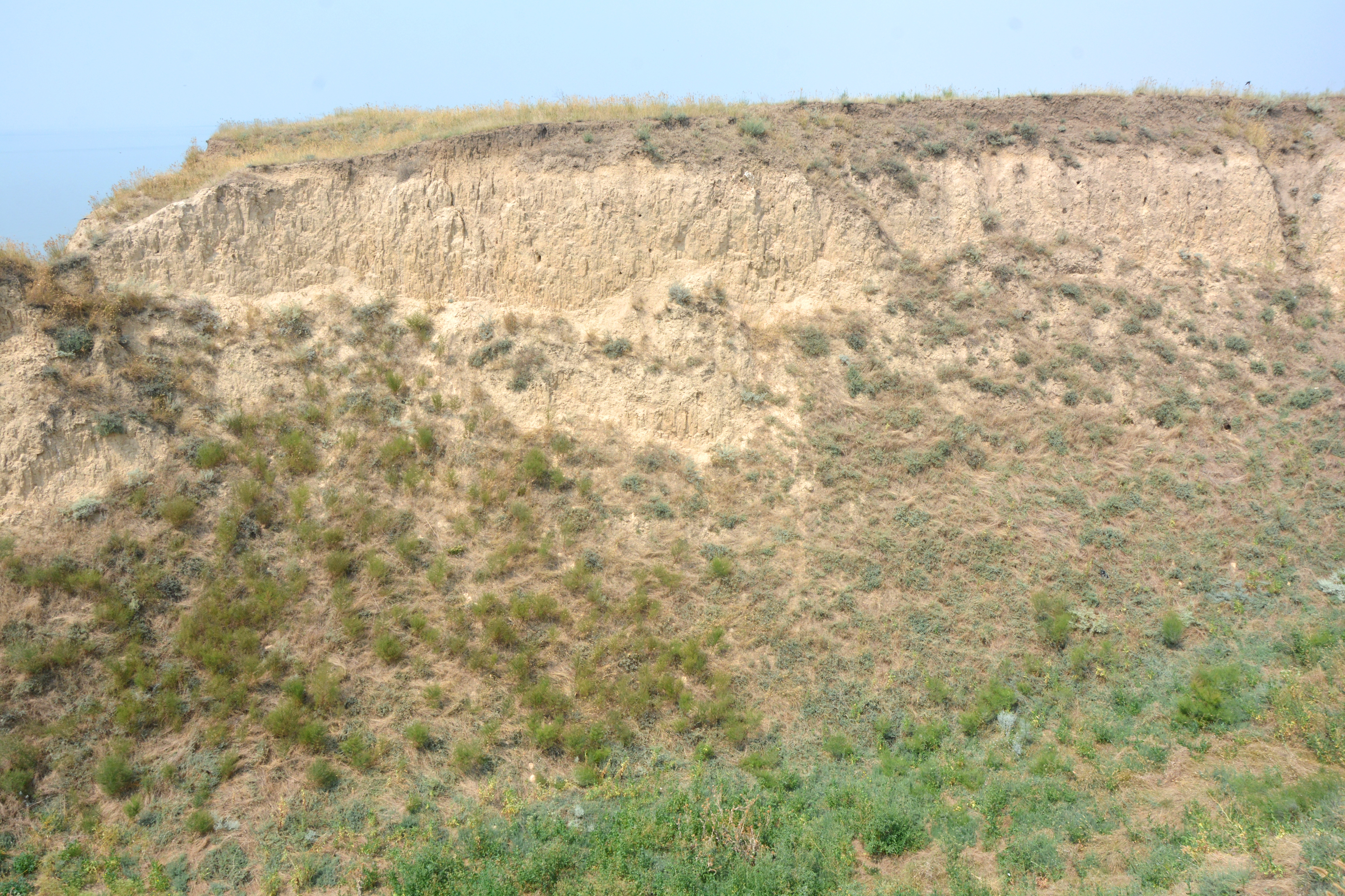 Станіславське городище, с. Станіслав